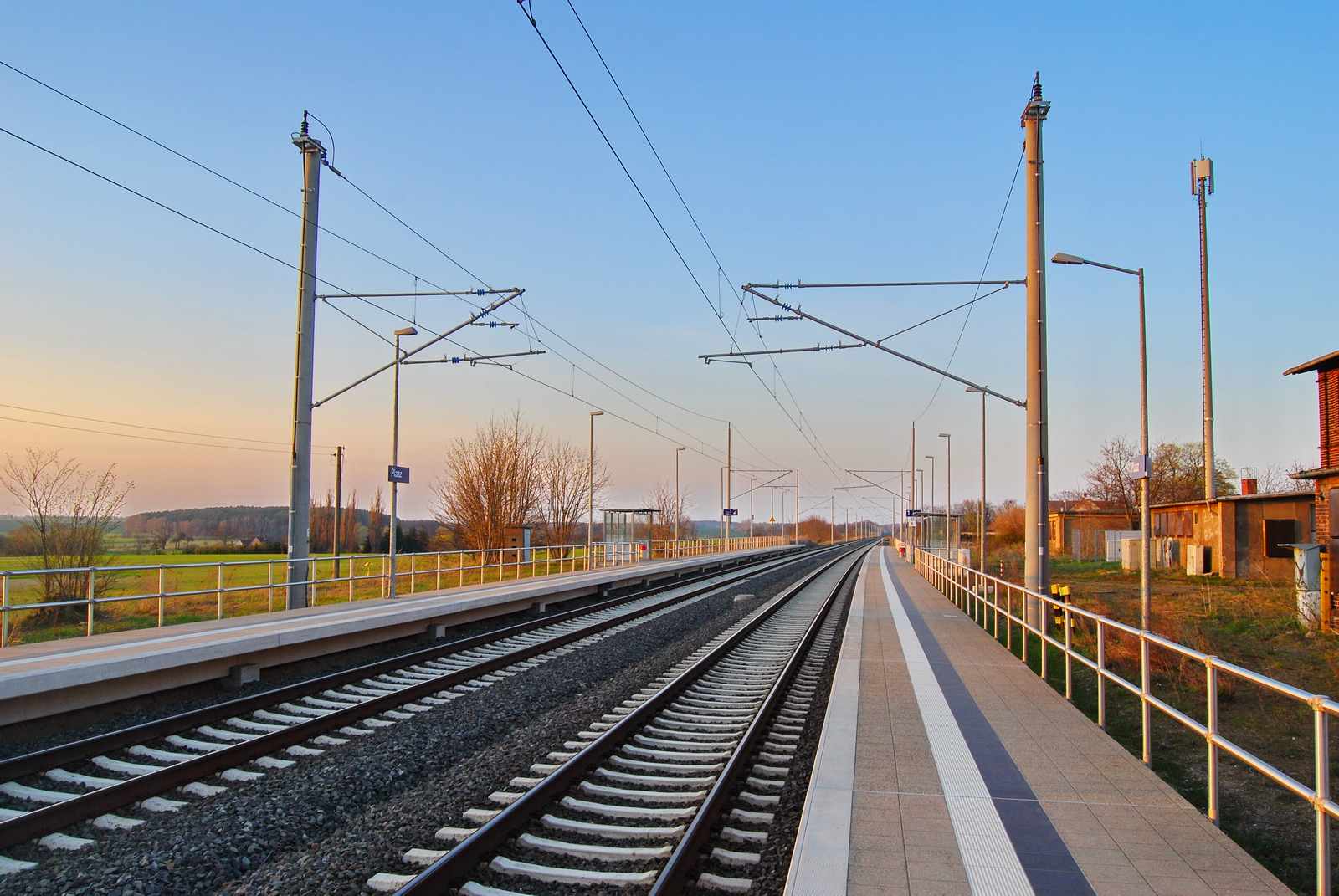 Bild von den Bahnsteiganlagen des Bahnhofes Plaaz, hier wurde die Strecke bereits vor einiger Zeit umgebaut.